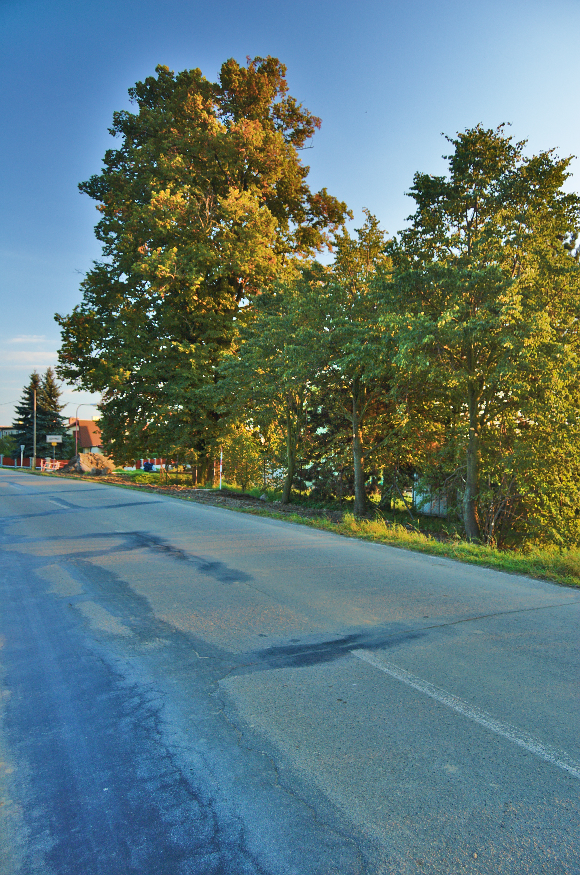 Hrubá lípa, Jedovnice, okres Blansko